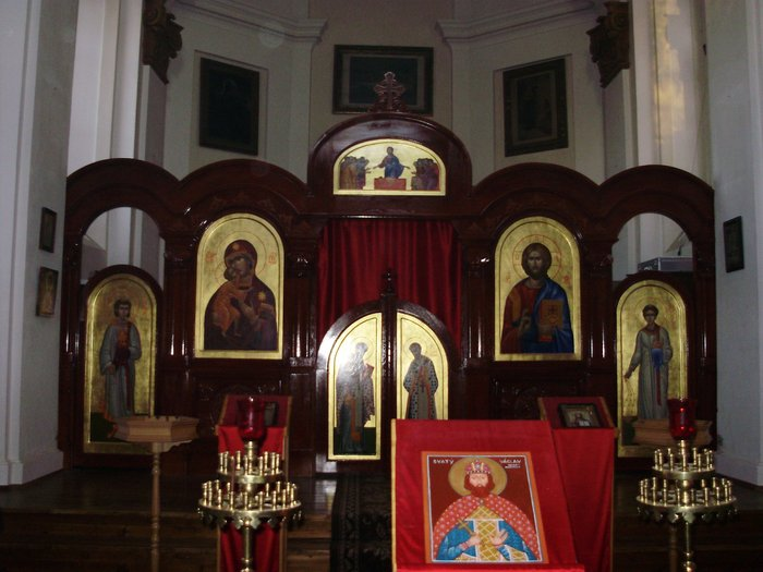 Interiér nyní